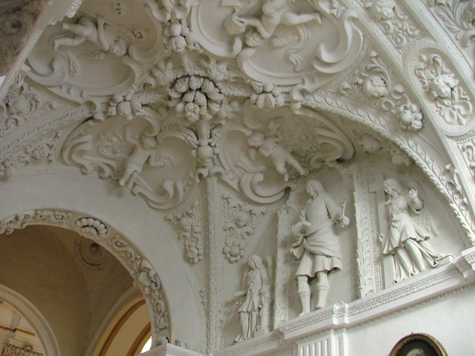 Autore: Rocco STASI FATTA DA ME Volta decorata con stucchi la cui realizzazione fu curata, nel '700, dall'architetto Domenico SANNAZZARO. GFDL, sono l'autore